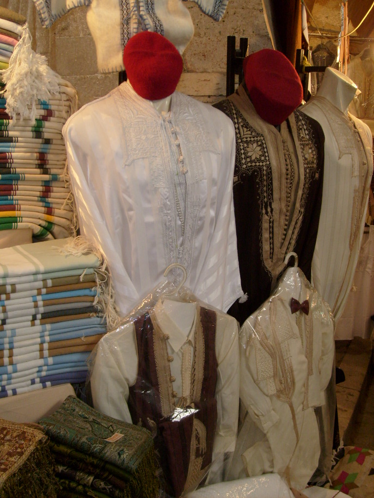 Jebbas traditionnelles vendues dans la médina de Tunis (Tunisie)